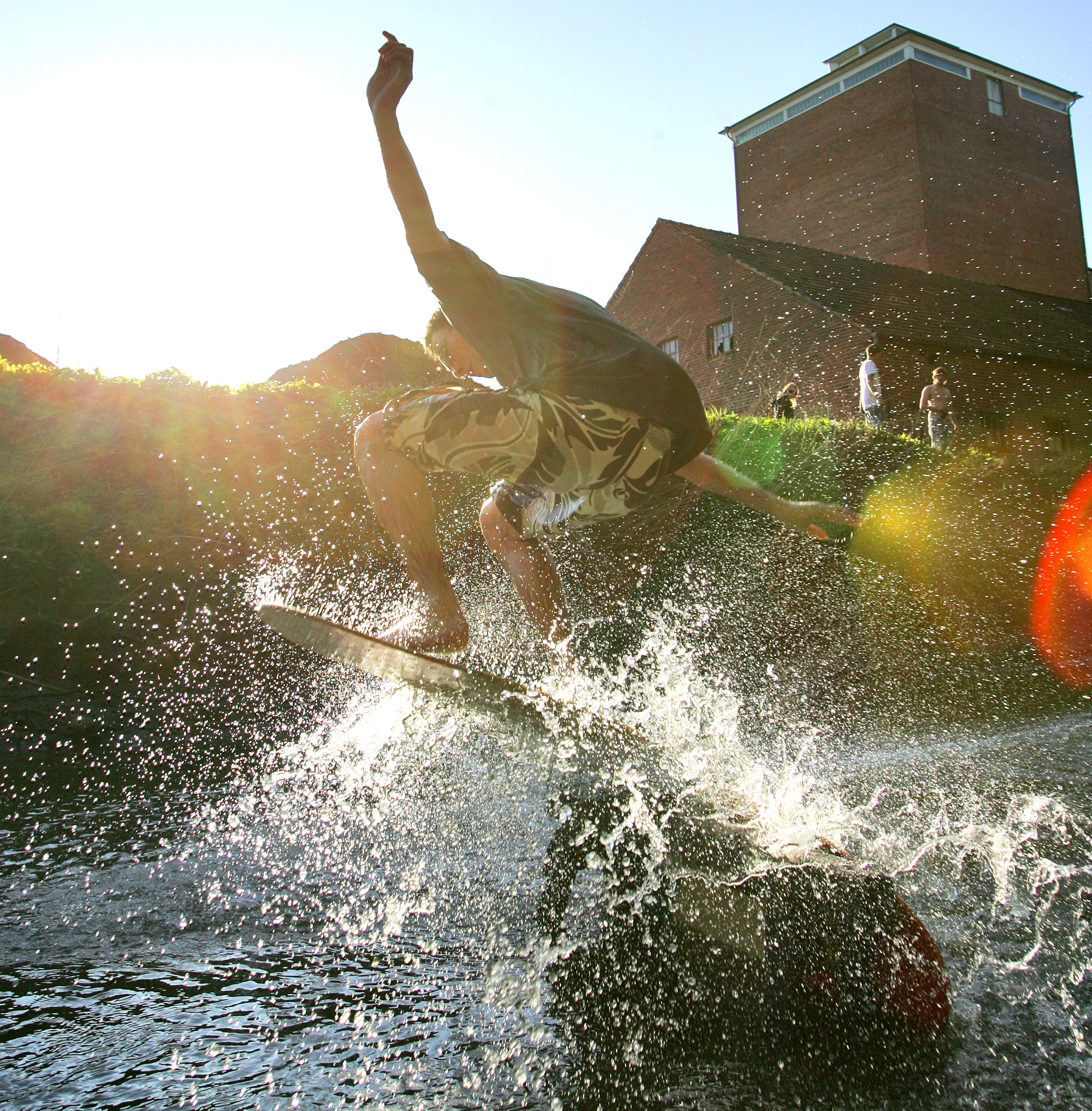 Skimboarder